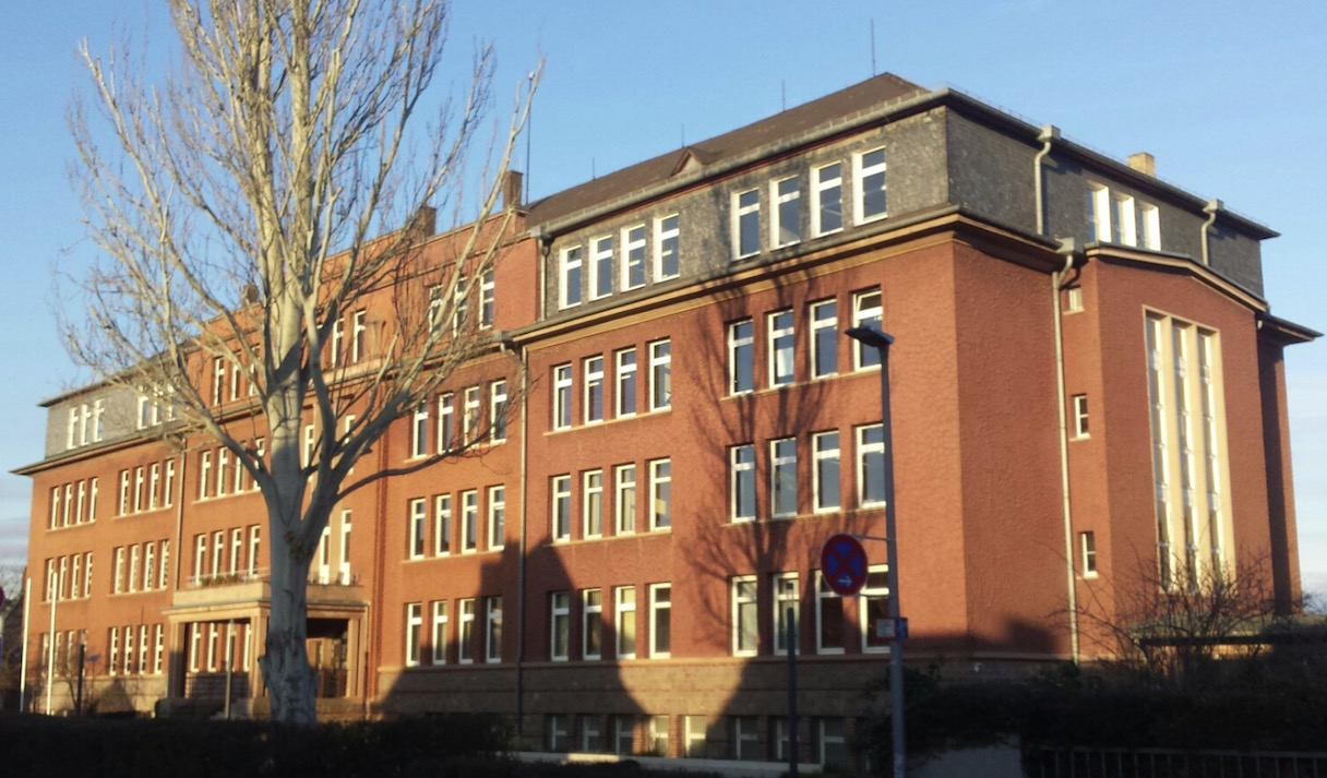 Ringschule Bad Kreuznach Architekt Willibald Hamburger